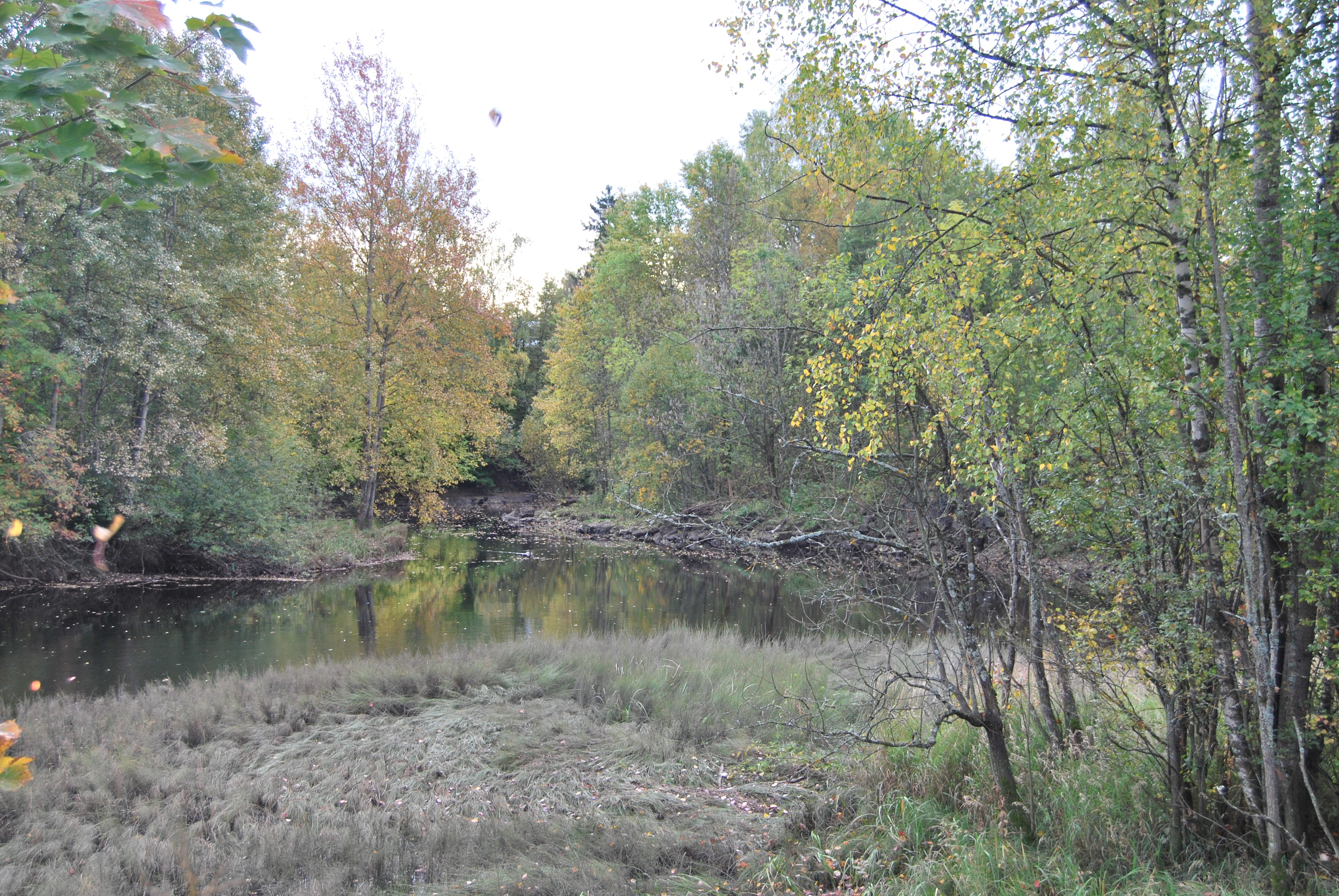 Eiksmarka (Oslo) 2009 r. Widok między Eiksmarką a Ekraveien.